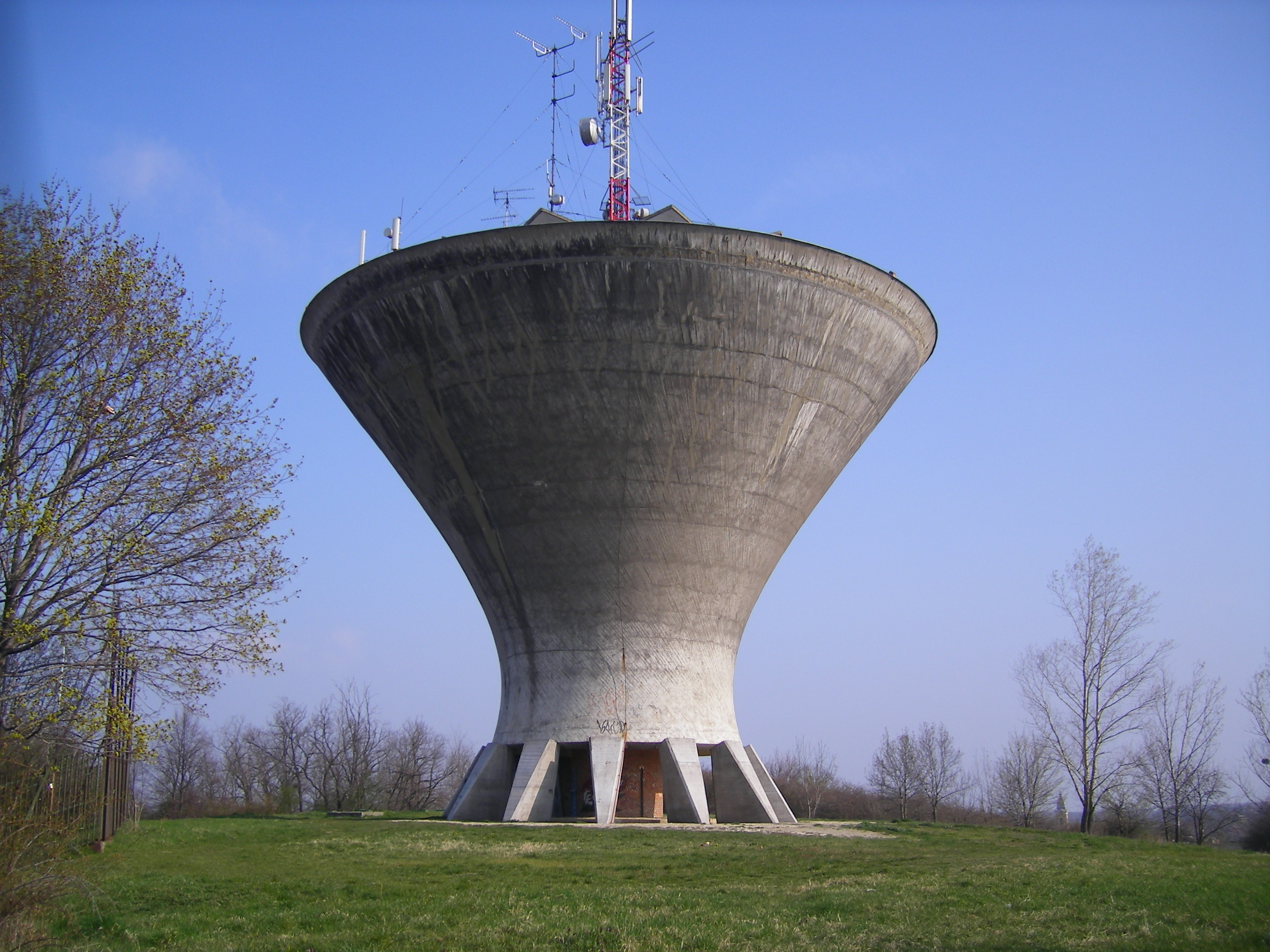 Oroszlány - víztorony a Haraszt-hegyen